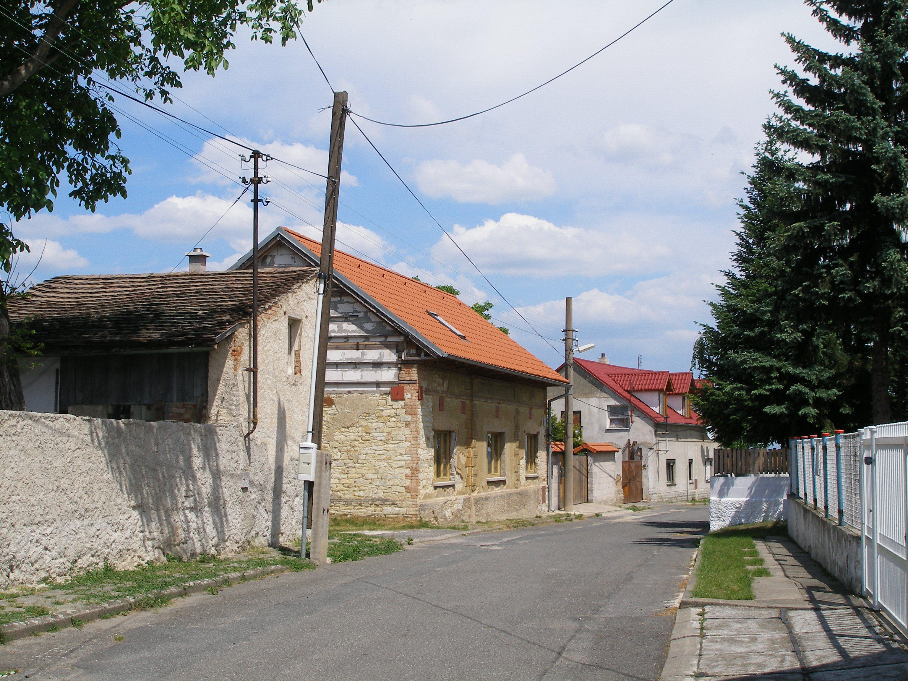 Zástavba v Drnově.